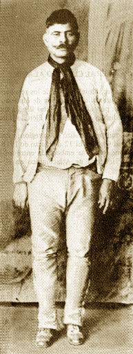 General Francisco Alarcón Sánchez